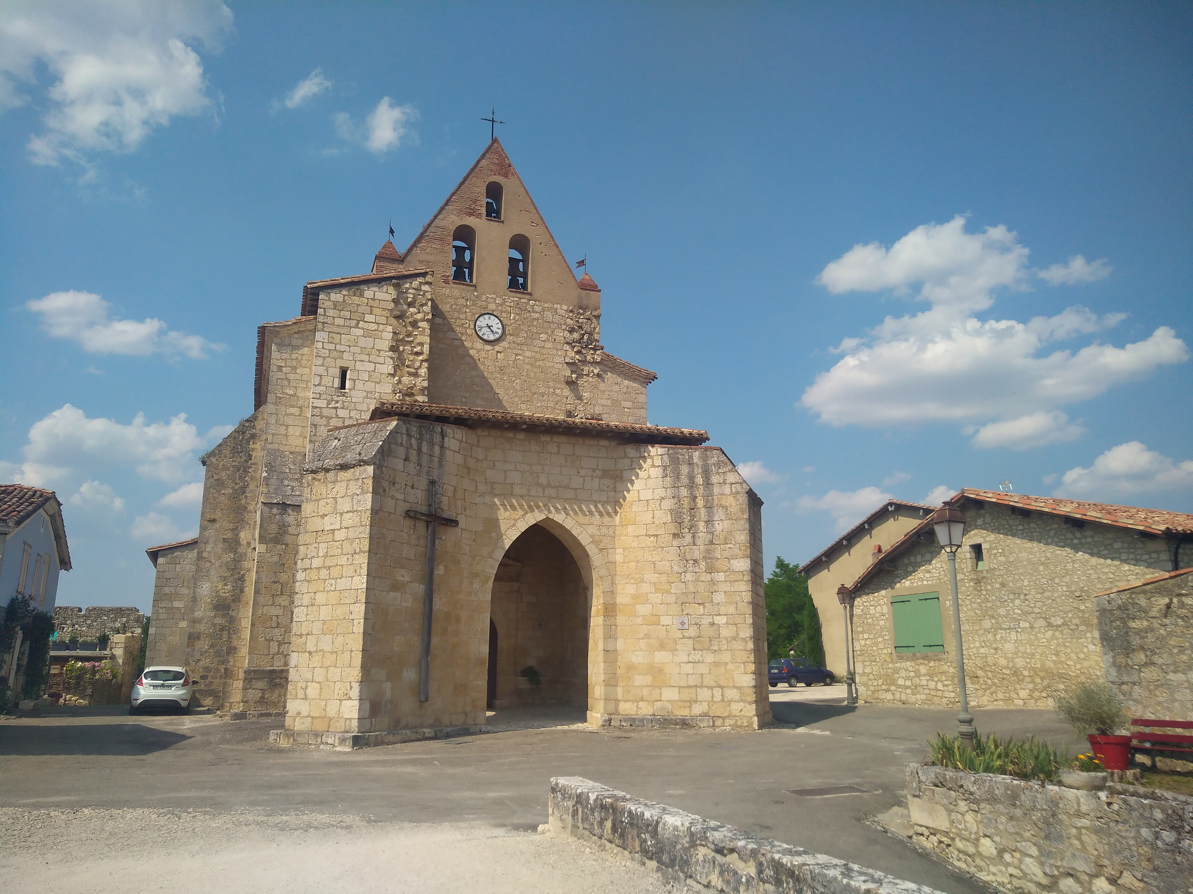 Église Saint-Orens de Maubec .